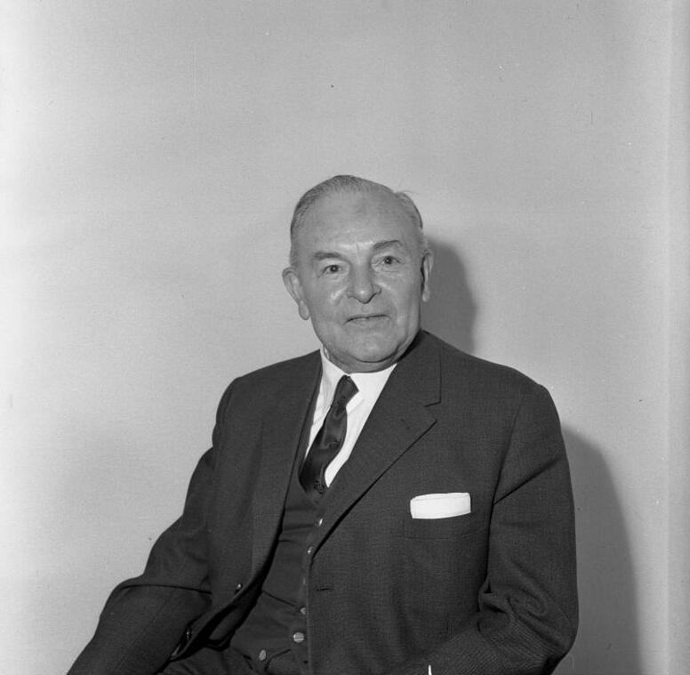 29.11.1961 Bayrische Landesvertreter im Gespräch